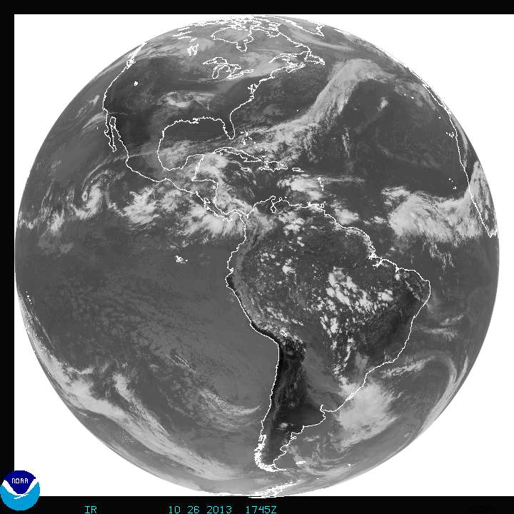 Imagen de satélite del Hemisferio Occidental obtenida por el Satélite Geoestacionario GOES. Puede verse que las tierras americanas del hemisferio Norte (México, América Central y norte de América del Sur) presentan poca nubosidad en comparación con la que existe en los océanos.